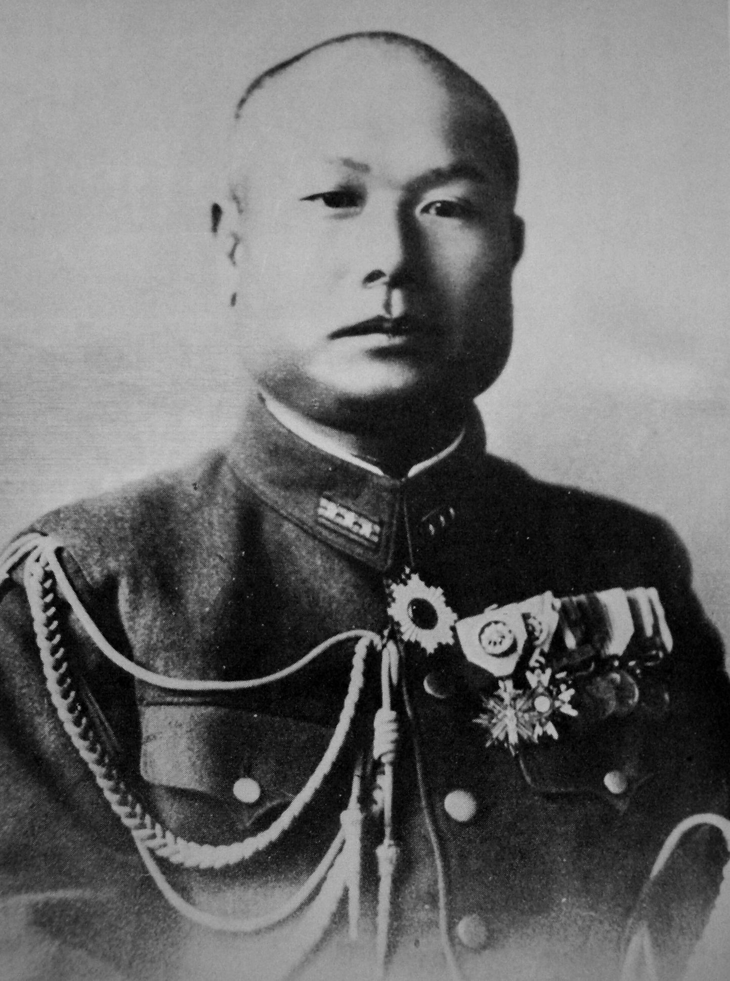 大佐時代の堀場一雄氏